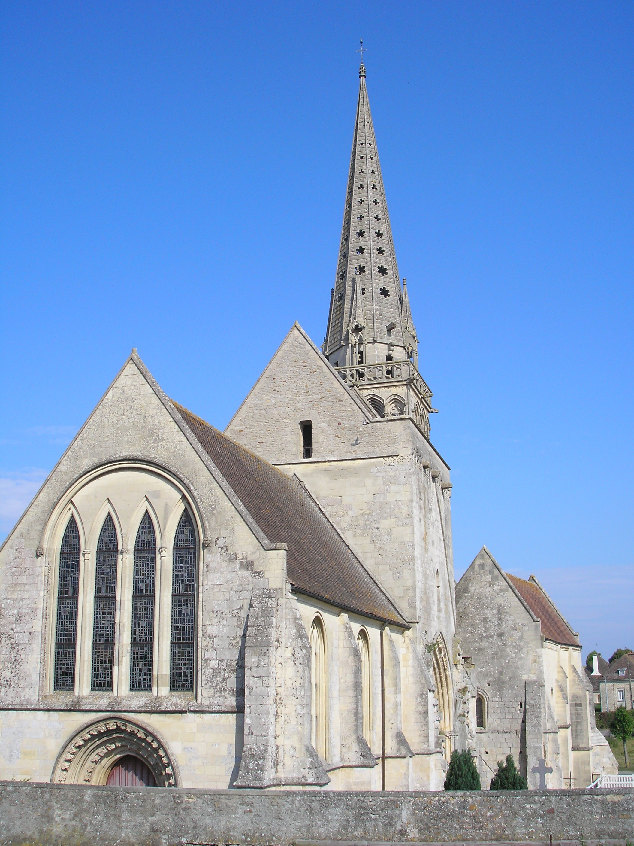 Rouvres (Normandie, France). L'église Notre-Dame.